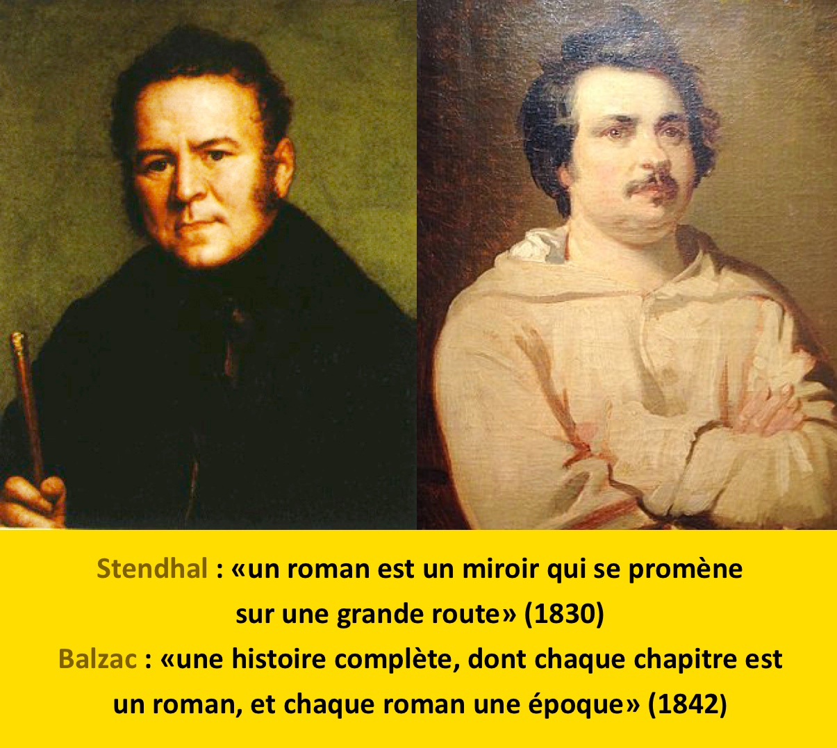 Stendhal et Balzac, citations Fichier Stendhal : Stendhal par Ducis.jpg Fichier Balzac : Balzac Boulanger.jpg